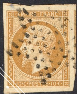 France stamp Napoleon III Empire , 10 cents (subtype 2) (1860)